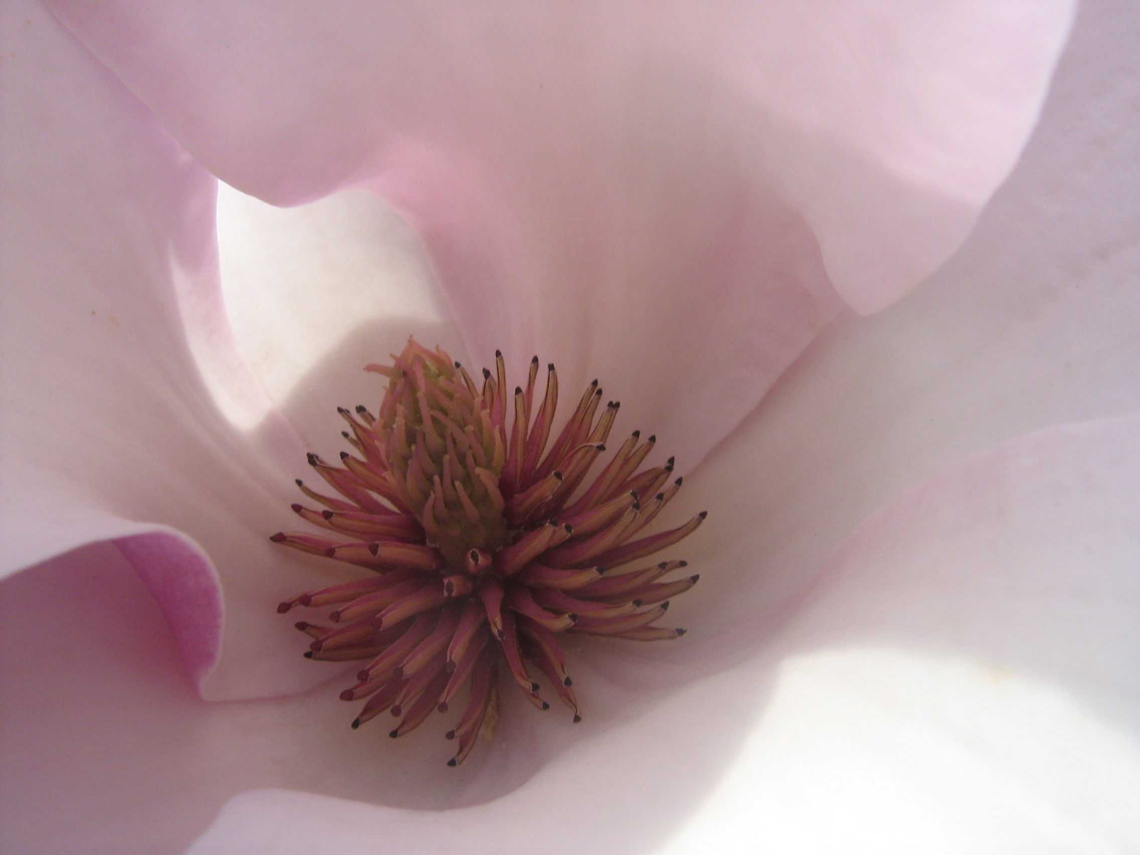 Магнолія Суланжа "Александріна" в Національному ботанічному саду імені Миколи Гришка НАН України.